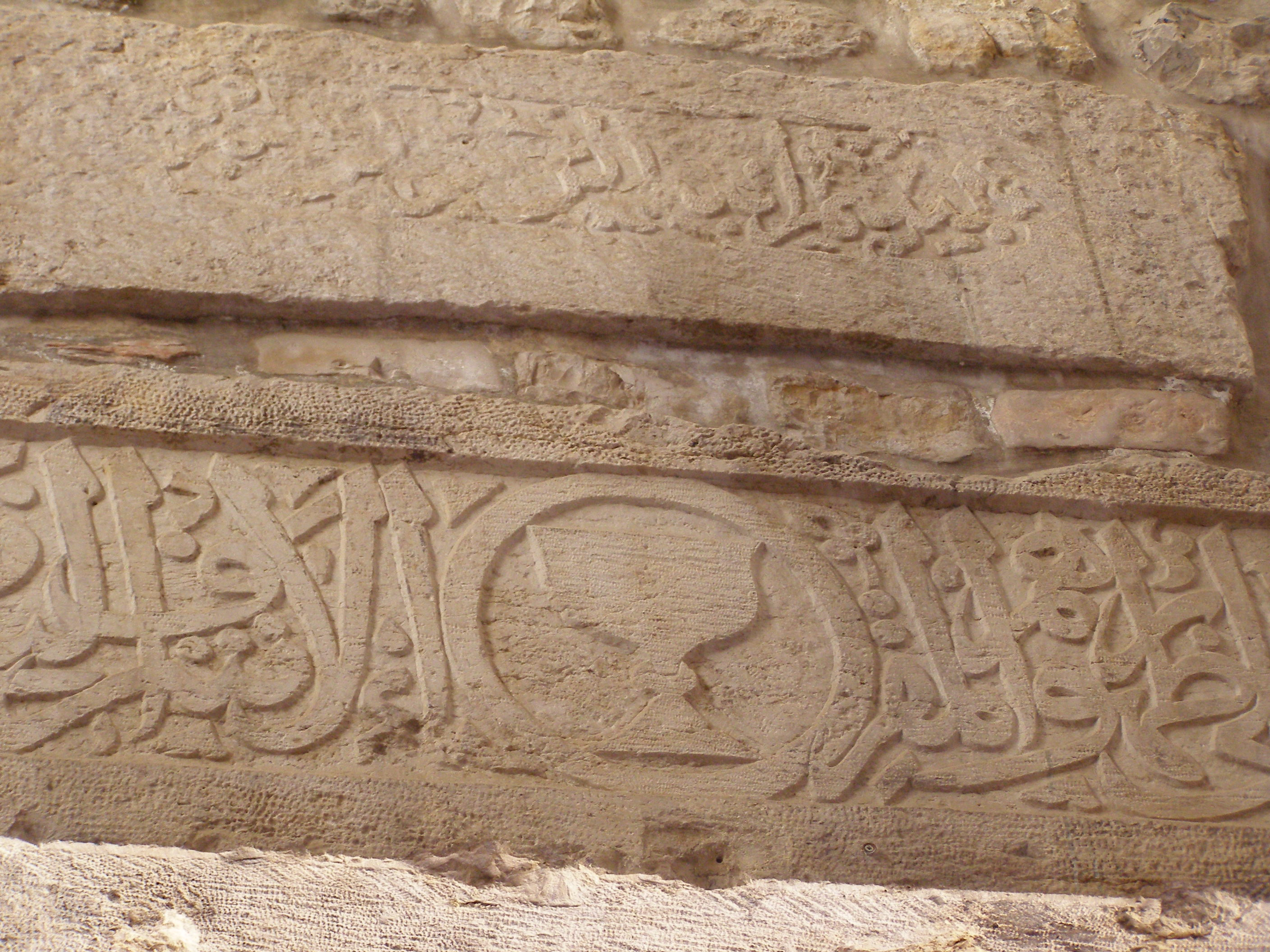 הכוס סמלו של תנכיז רישיון נוצר על ידי משתמש:Ranbar